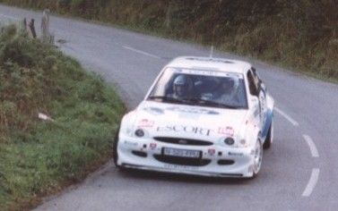 Daniel Alonso en el Rallye Príncipe de Asturias 98